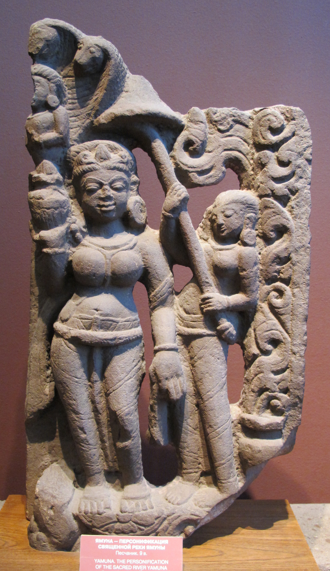 Yamuna, personificazione del fiume sacro yamuna, IX sec